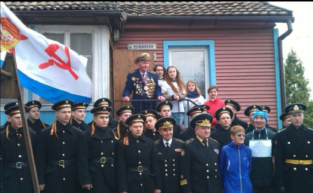 Фотография с ежегодного марафонского пробег в честь Анатолия Птицына